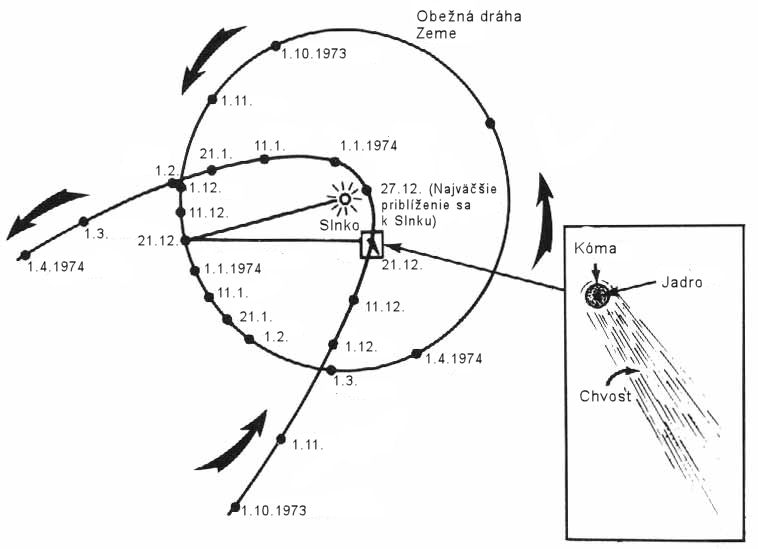 Obežná dráha Kohoutek kométy, 1973–1974